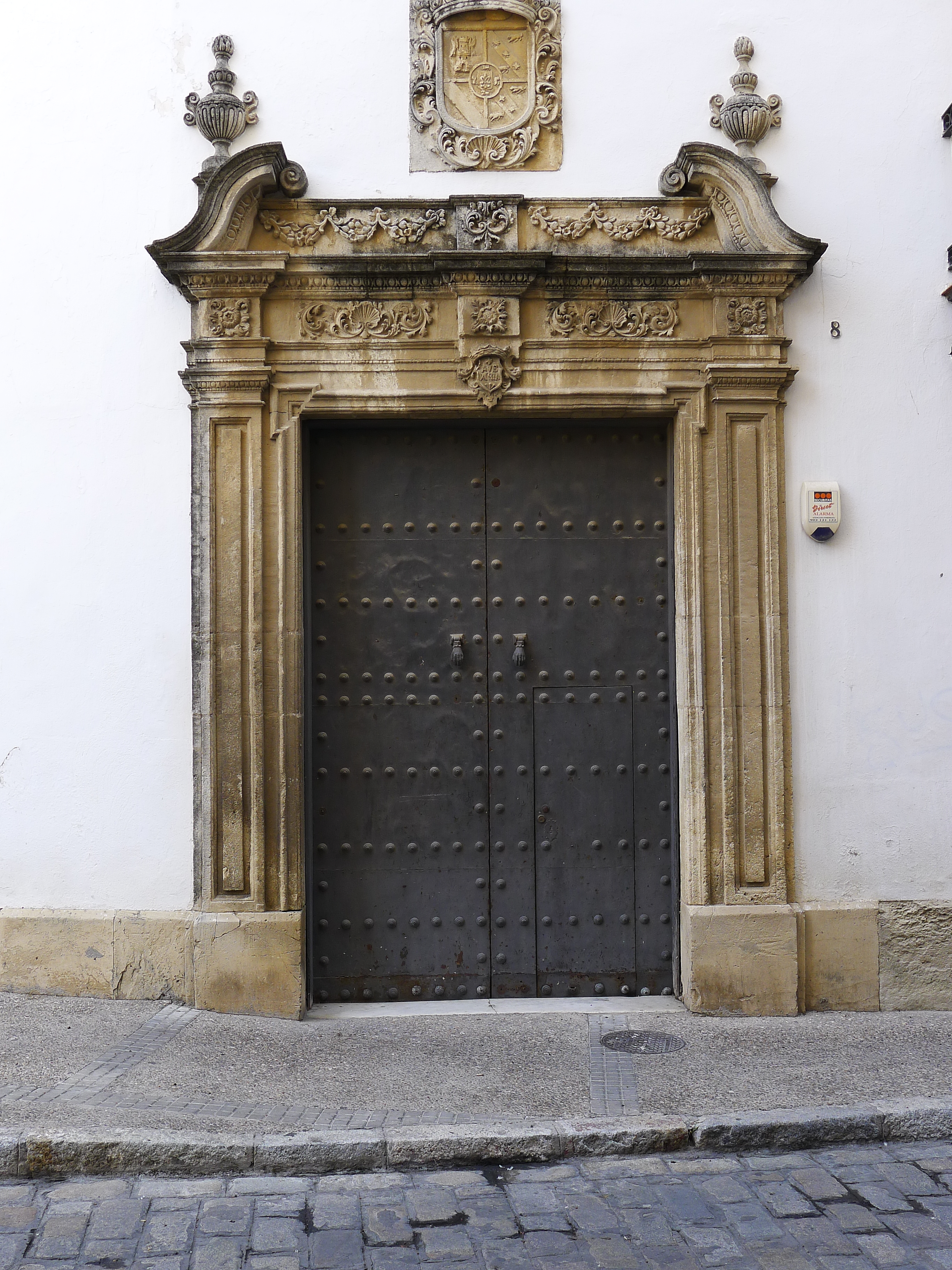 Portada de la casa Conde de los Andes en Jerez de la Frontera.